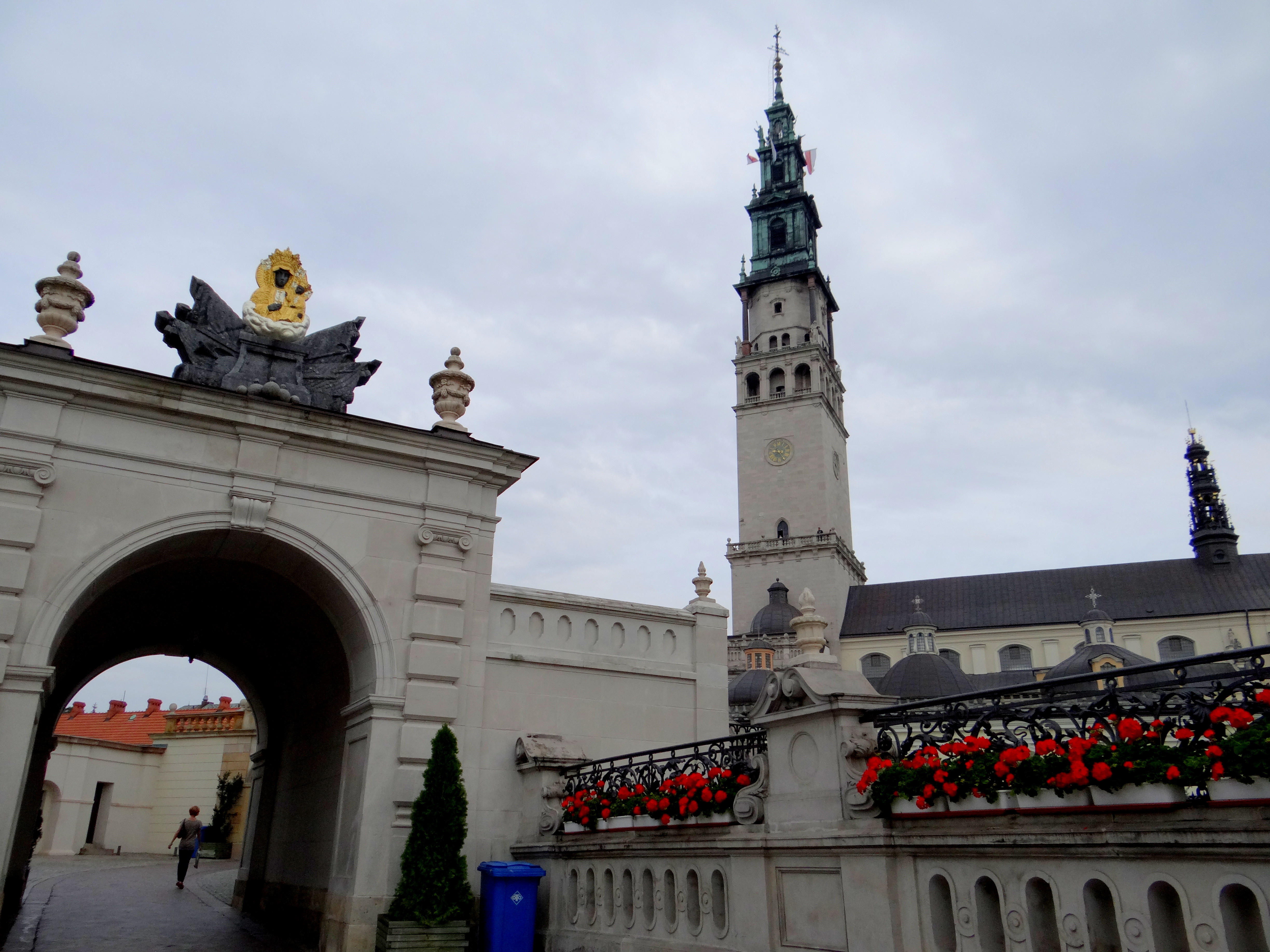 Zespół klasztorny oo. Paulinów: Kościół pw. Wniebowzięcia NMP i Znalezienia Krzyża Św. z kaplicami, zakrystią, skarbcem, wieżą, klasztorem, zabudowaniami gospodarczymi, arsenałem, drukarnią, domem muzykantów, twierdzą z bramami i bastionami, park Częstochowa, Częstochowa